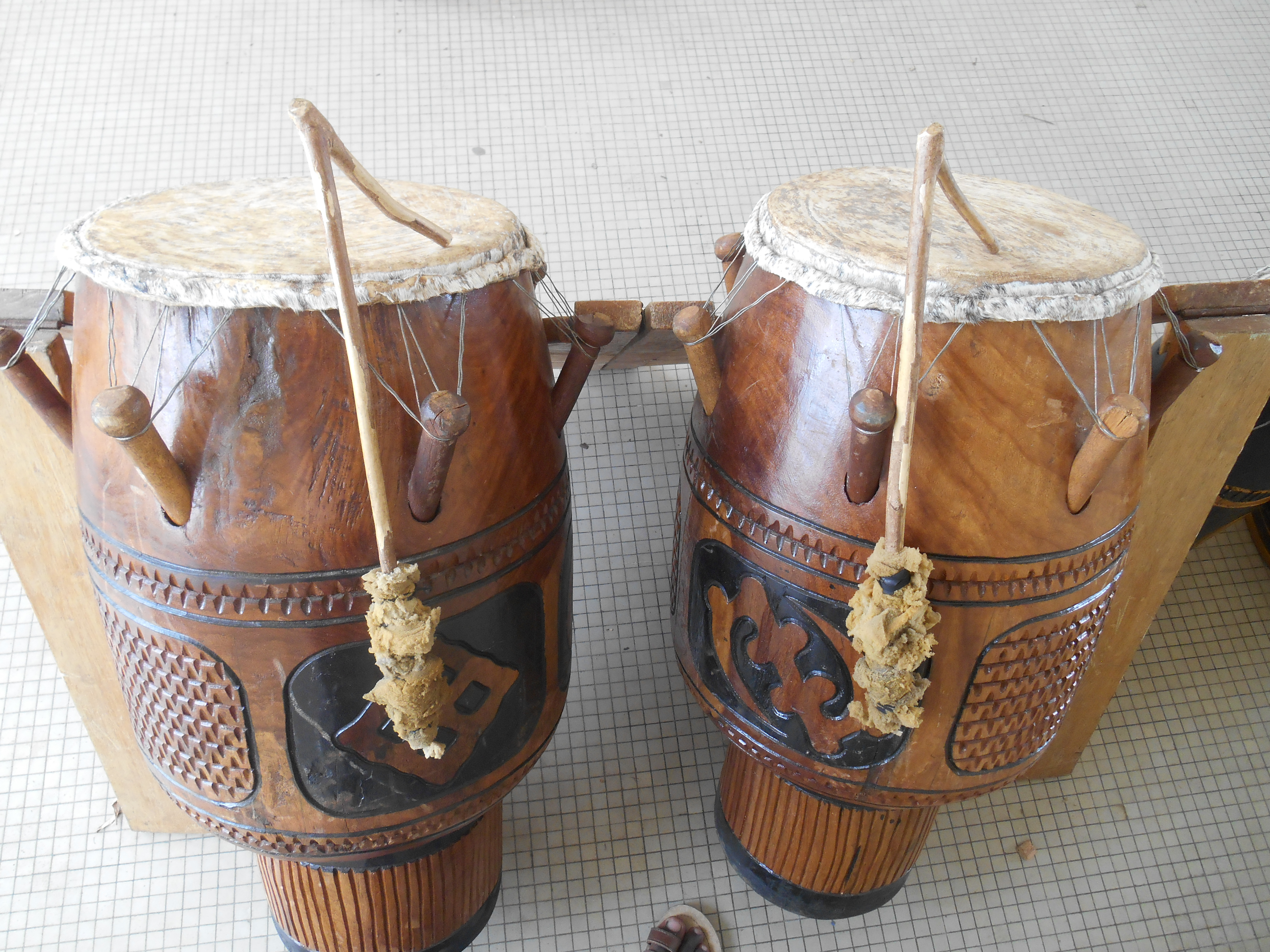 Cette paire de tambours s'appelle ATUMPAN. ET ces tambours sont utilisés dans l'exécution de la danse Adowa. Cette Danse est exécutée dans la région ashanti de Pankronu et en Côte d'ivoire par le peuple Bron-akan dans la région du Gontougo. This is an image from Ivory Coast